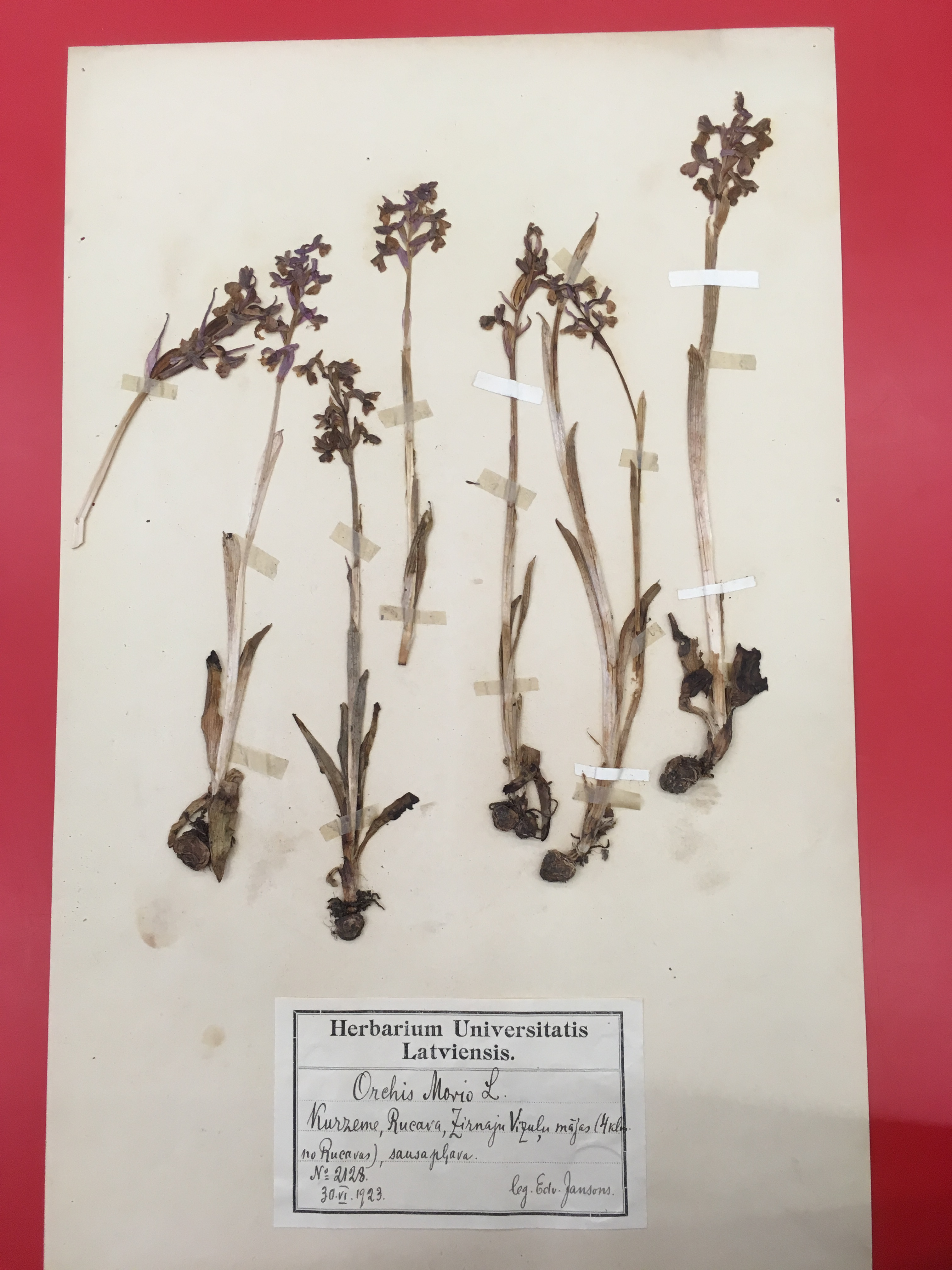 Zalkšu dzegužpuķe - Orchis morio L. Herbārija eksemplārs no LU herbārija RIG (LU Muzeja krātuve)